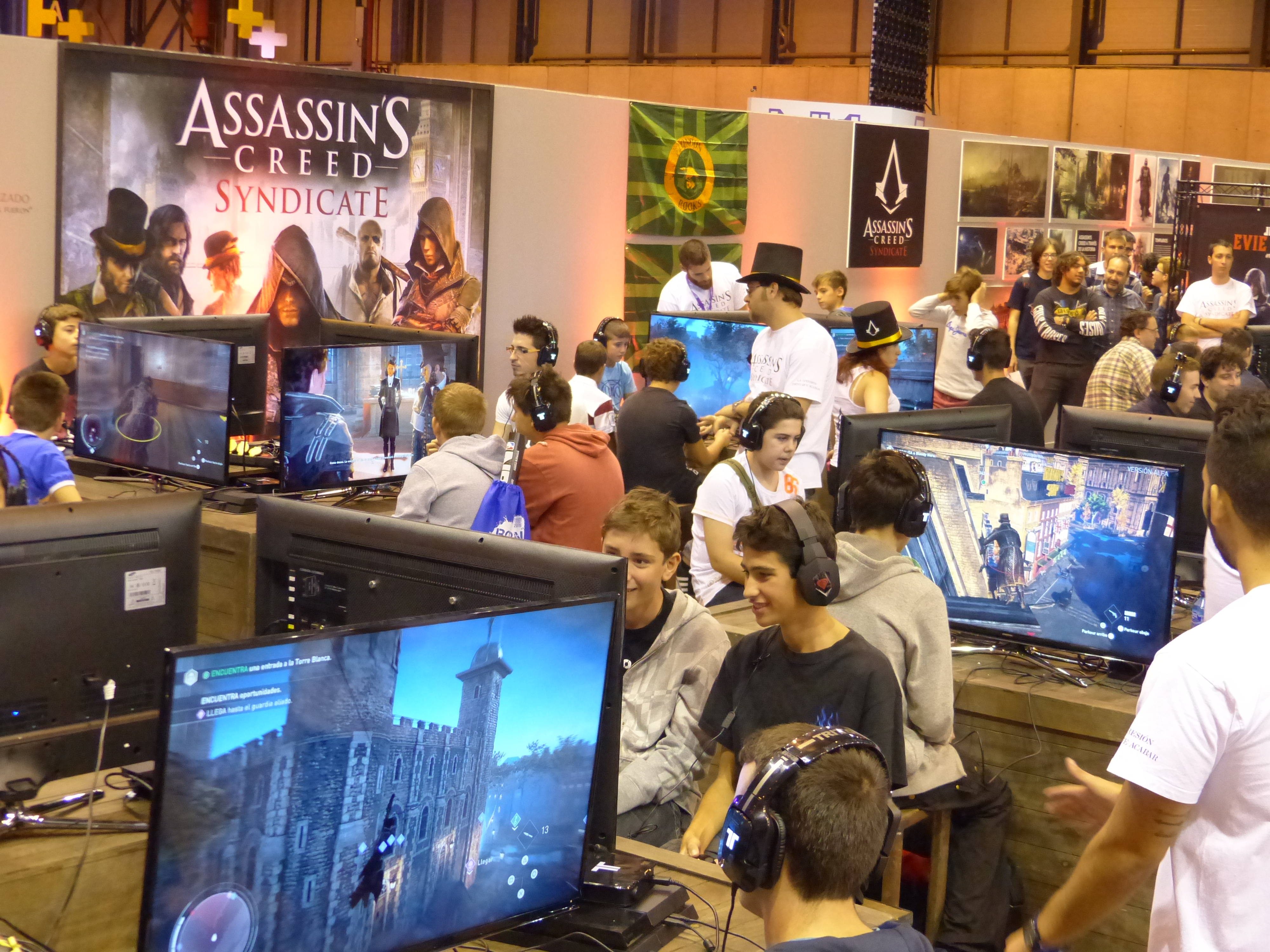 Madrid Games Week, Assassin's Creed, syndicate.